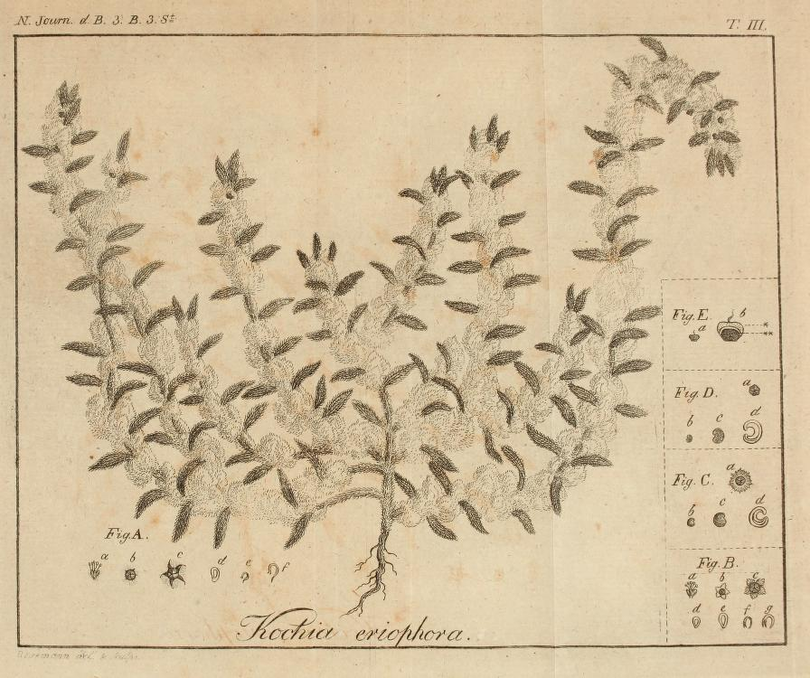 Bassia eriophora (Schrad.) Asch., as Kochia eriophora Schrad., from Schrader, H.A. 1809. Über Pallas's Halophyta, mit besondrer Rücksicht auf die Gattungen Salsola und Svaeda. Neues Journal für die Botanik 3(3): 58–92. Tab. 3. A: Kochia eriophora (= Bassia eriophora) B: Kochia scoparia (= Bassia scoparia) C: Chenopodium radiatum D: Chenopodium altissimum (= Suaeda altissima) E: Salsola kali (= Kali turgida or Kali tragus)